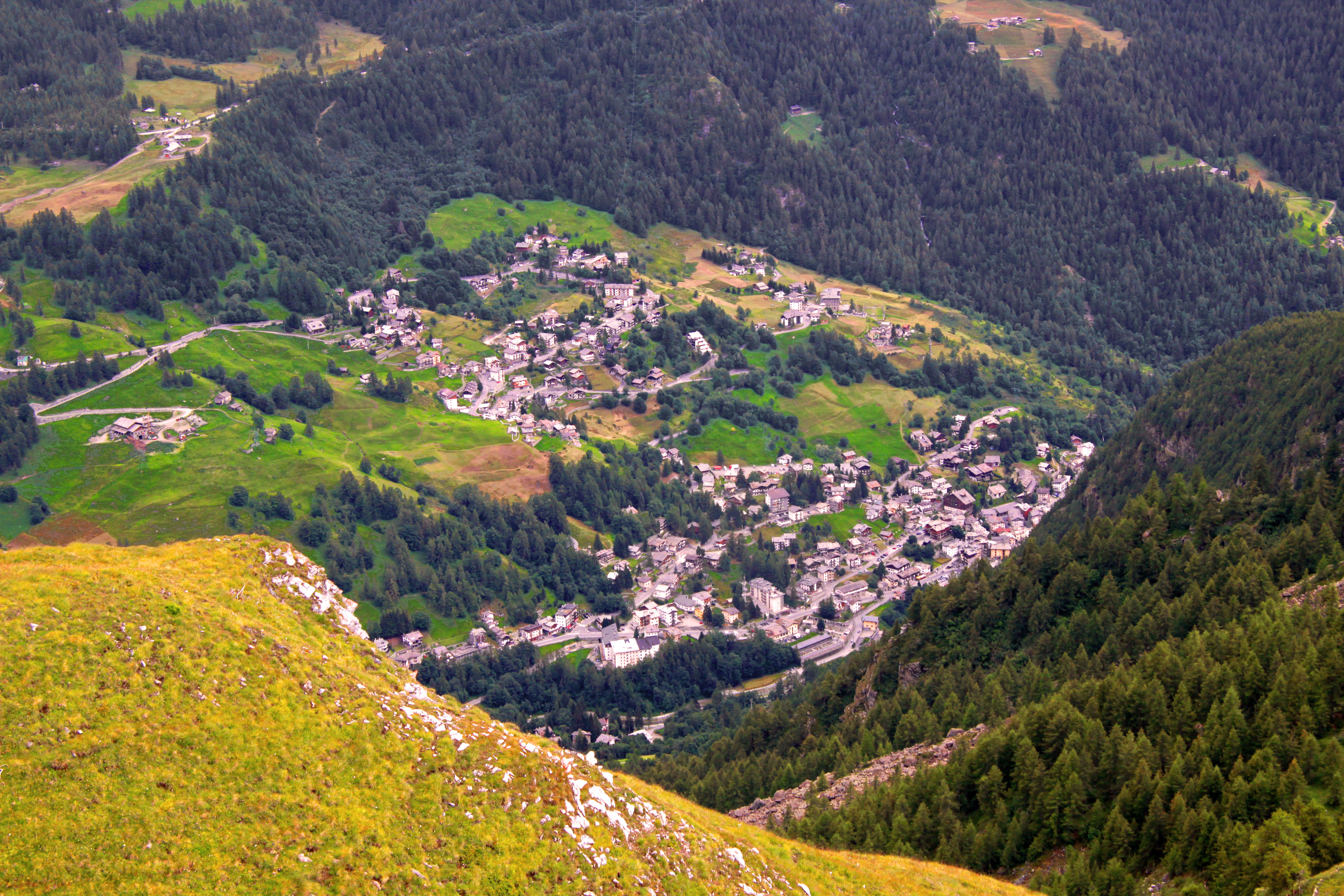 Valtournenche, Valle d'Aosta, Italia.